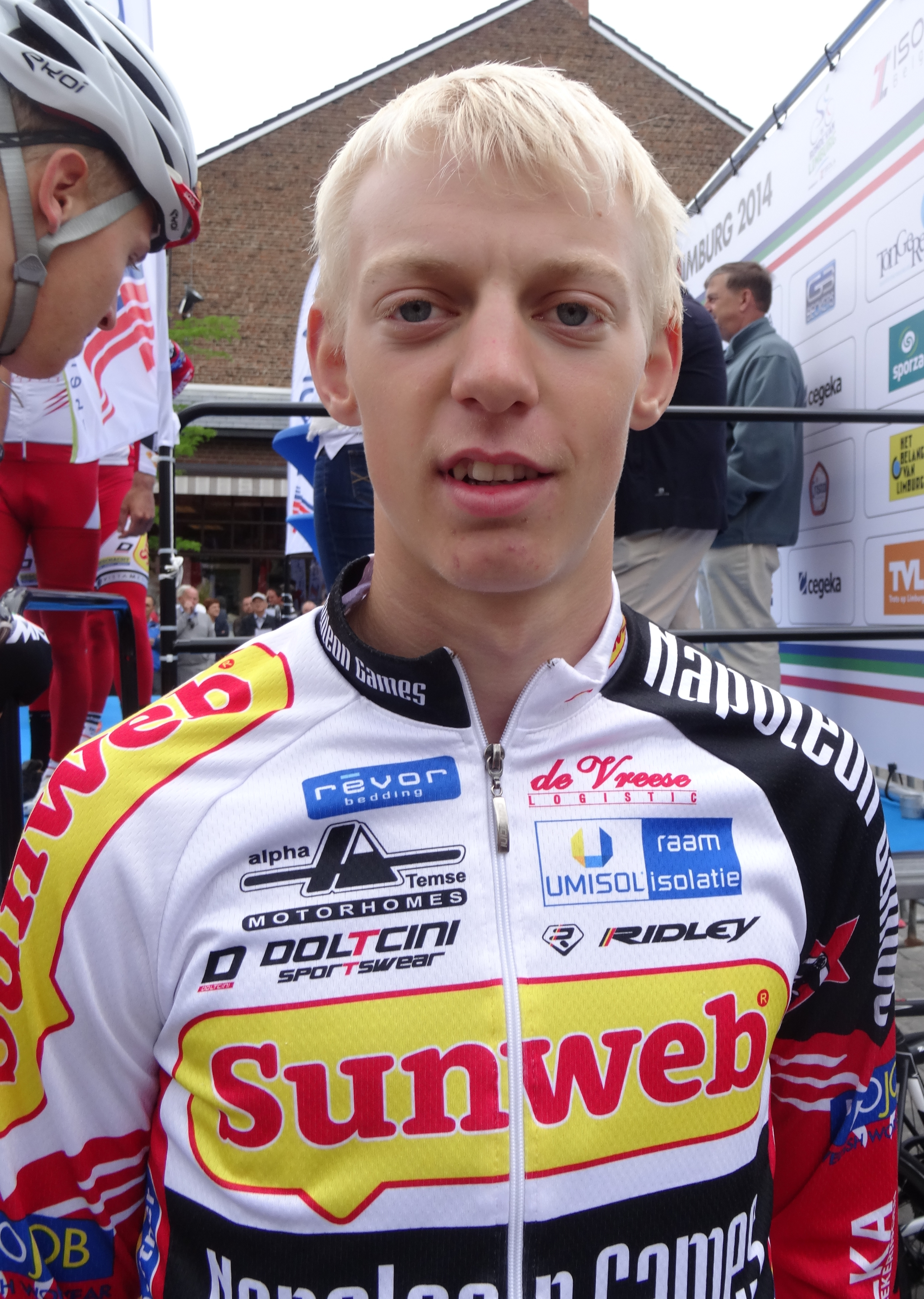 Reportage photographique réalisé le dimanche 15 juin à l'occasion du départ et de l'arrivée du Tour du Limbourg 2014 à Tongres, Belgique.